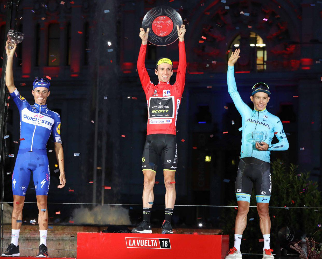 La plaza de Cibeles de Madrid ha vuelto a ser el punto final de los 3.254,7 kilómetros de la Vuelta a España 2018 cuyo ganador ha sido este año el británico Simon Yates. La alcaldesa de Madrid, Manuela Carmena, ha asistido al final de la prueba y ha entregado el trofeo al vencedor de la última etapa, el italiano Elia Viviani, además de al español Enric Mas, segundo en la clasificación general. Tras recorrer 100 kilómetros de distancia entre Alcorcón y Madrid, los corredores han dado diez vueltas al circuito urbano de 5,5 kilómetros, dentro de la última etapa, la vigésimo primera.